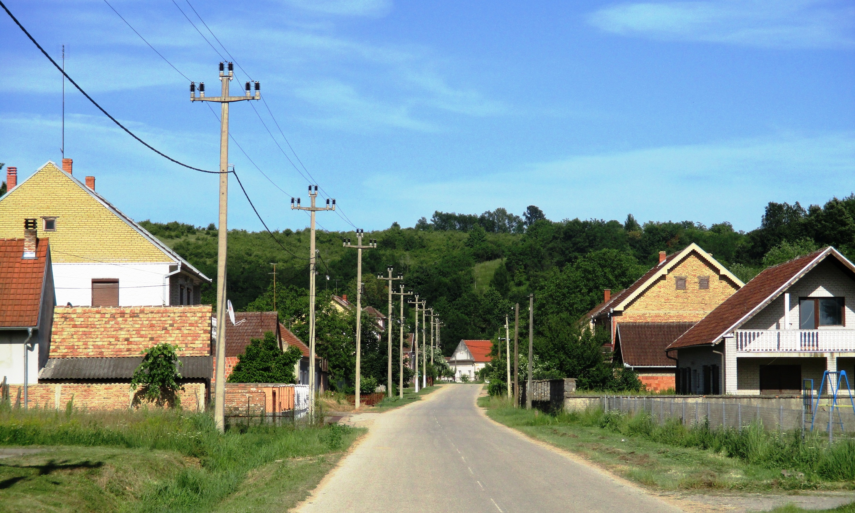 Улаз у село Месић - Entrance of Mesić village